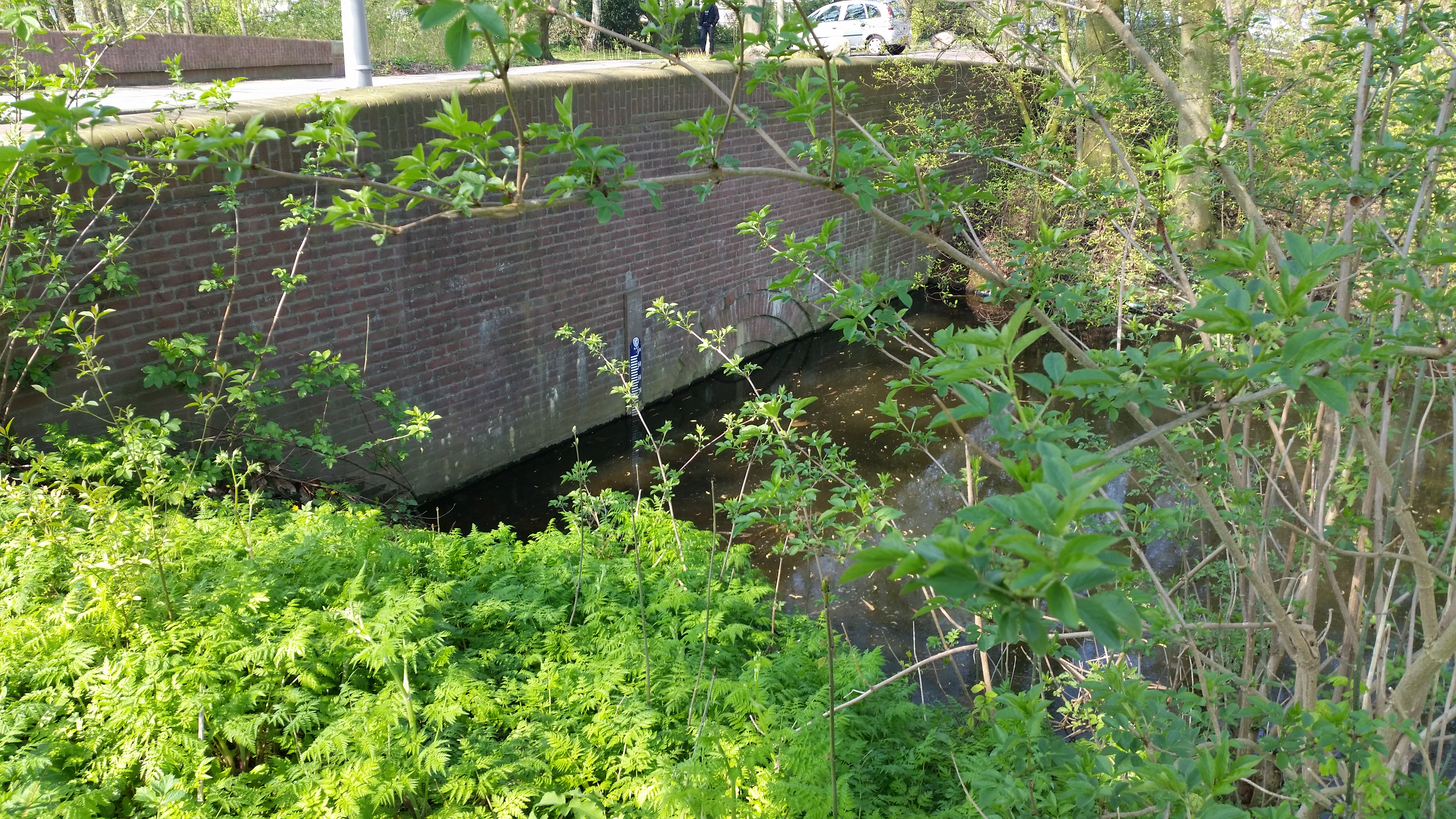 Zijaanzicht van Brug 267 (in Amsterdam)